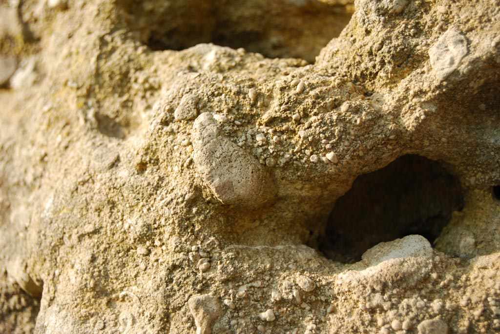 Detailaufnahme eines Ith-Felsens.